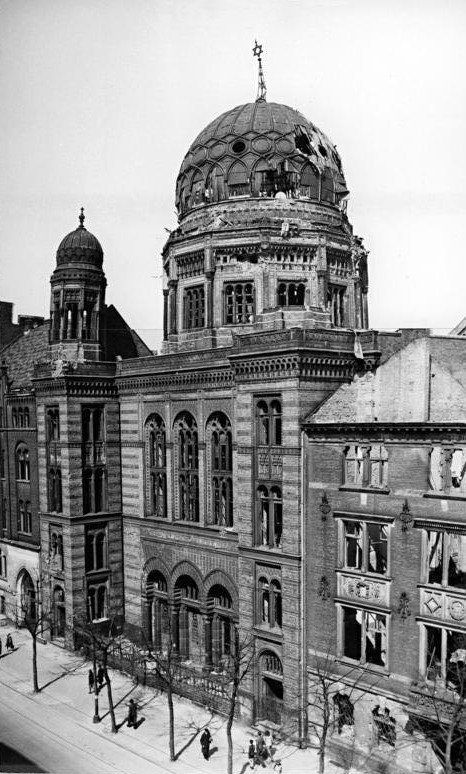 Berlin, Oranienburger Straße, Synagoge, Ruine ADN-ZB Heinscher-go Berlin Die im II. Weltkrieg zerstörte Synagoge im der Oranienburger Straße Aufn. April 1948 1388-48